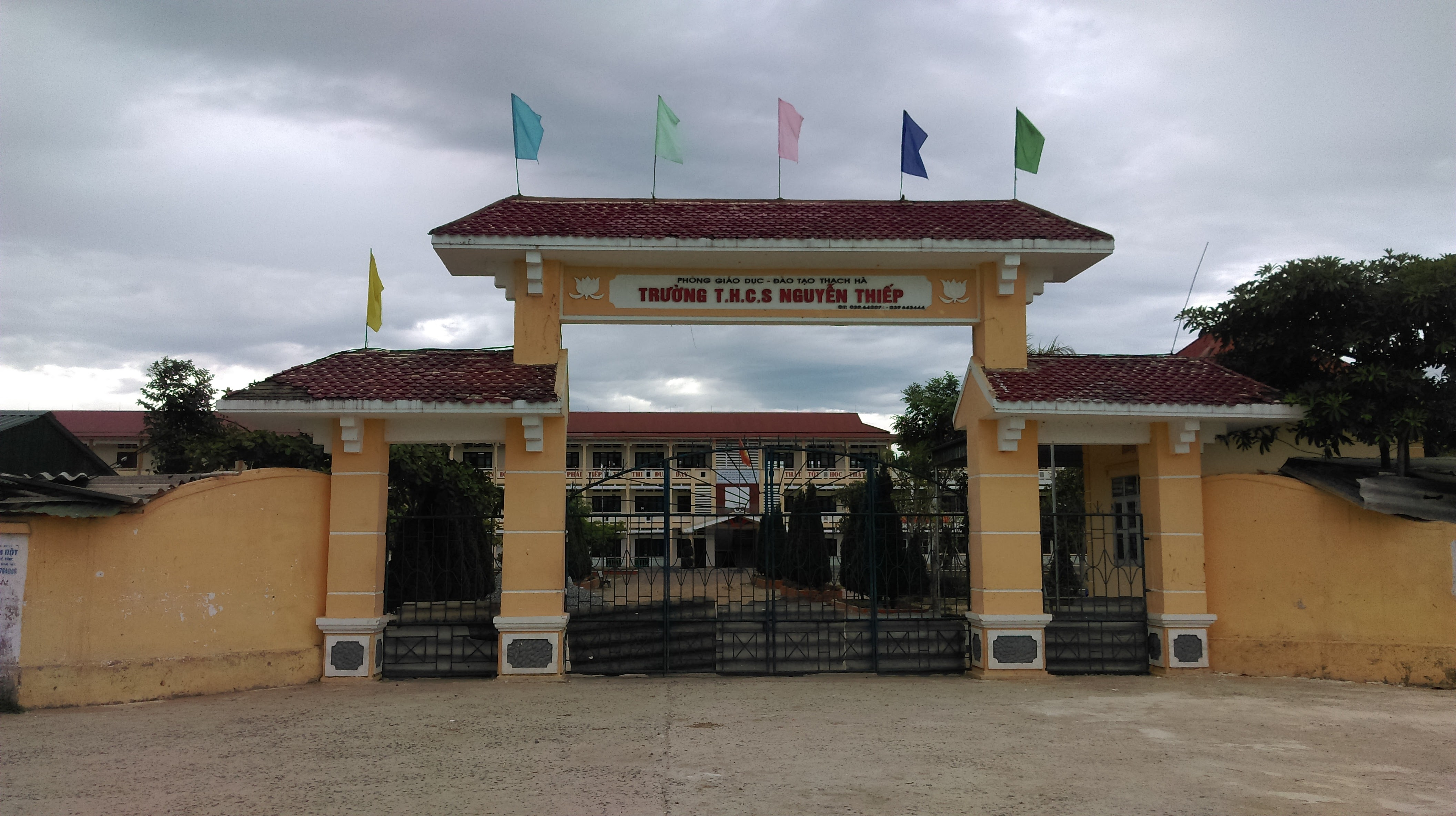 Trường THCS Nguyễn Thiếp, Thạch Kênh, Thạch Hà, Hà Tĩnh